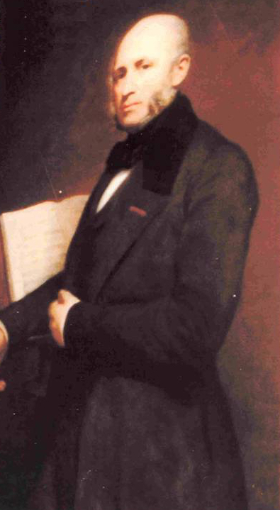 Édouard Rodrigues (1796-1878)